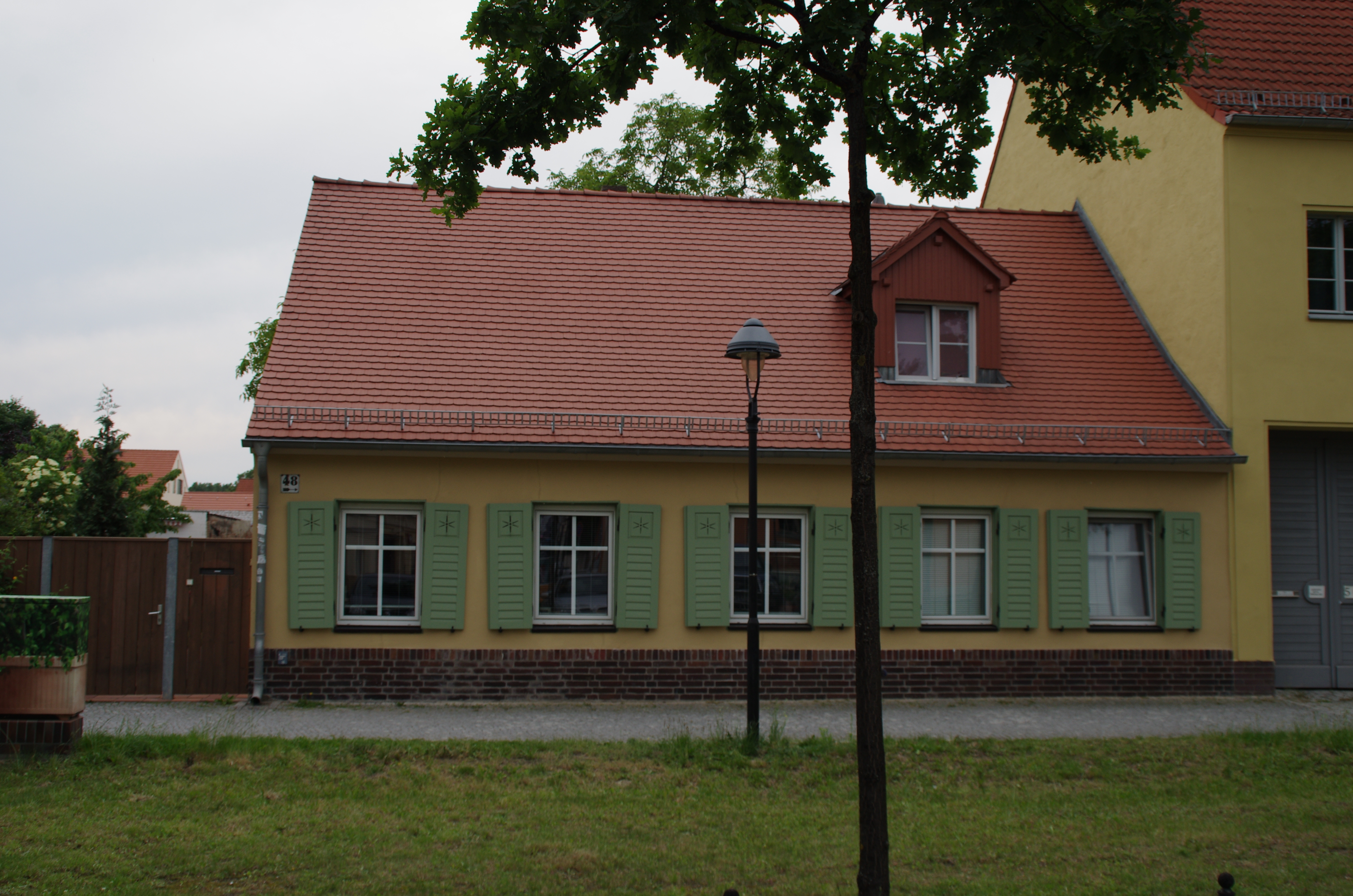 Potsdam Ortsteil Babelsberg. Das Haus der Kolonie Alt Nowawes steht unter Denkmalschutz, 1764.